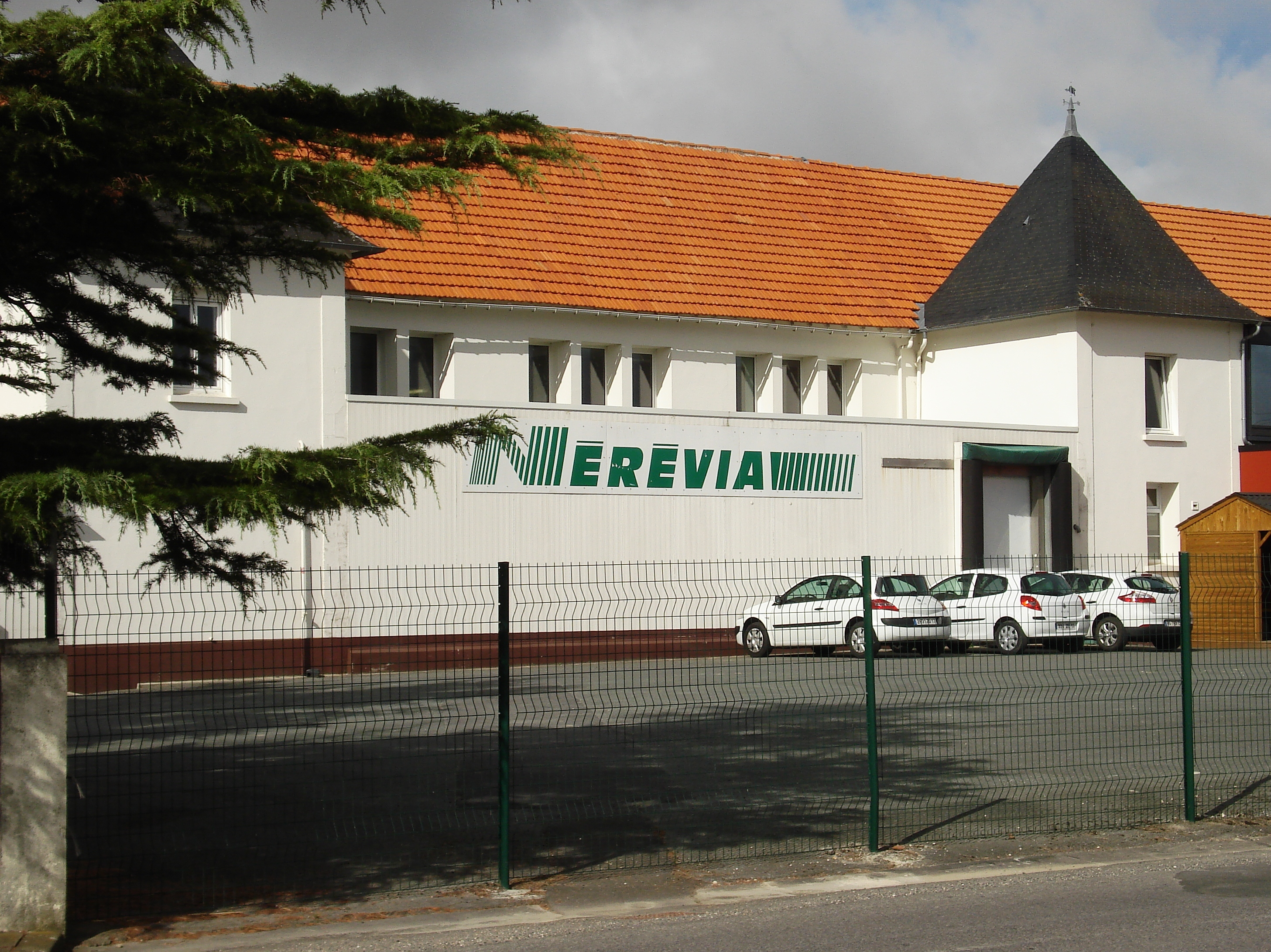 L'usine Nérévia de Néré en Charente-Maritime